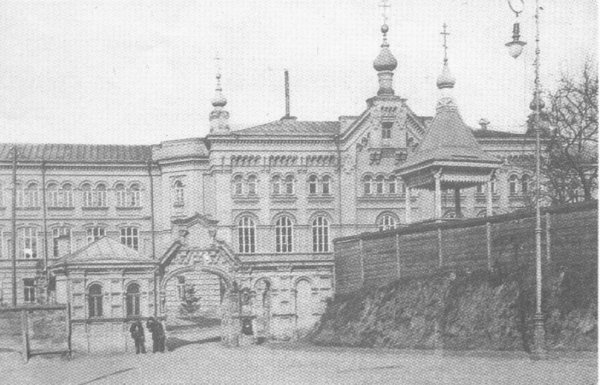 Здание Киевской духовной семинарии